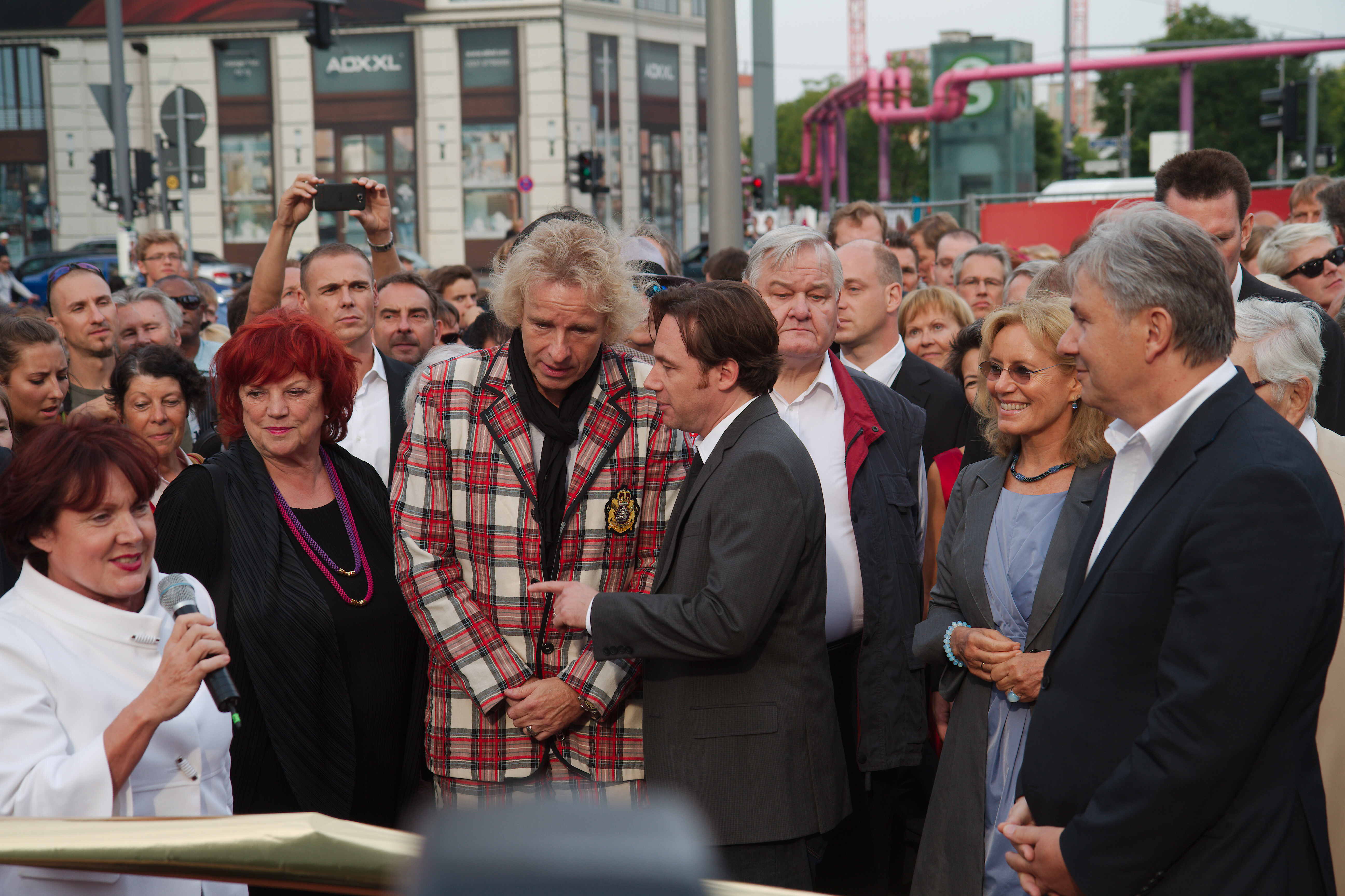 Gottschalk und Wowereit